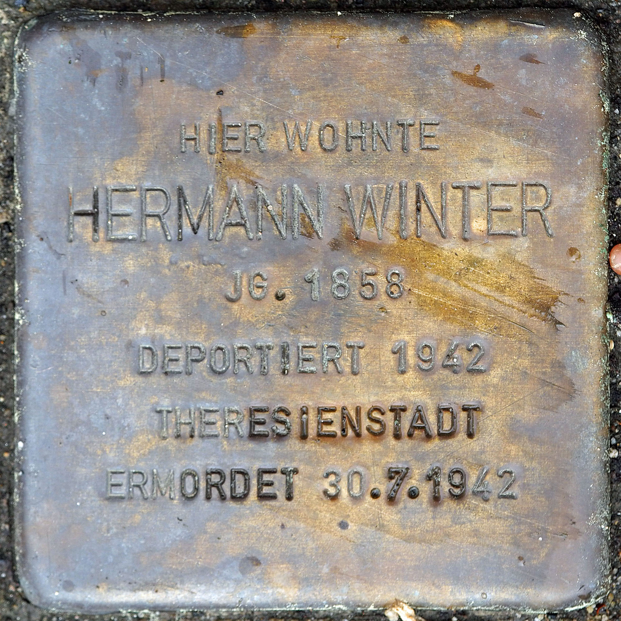 Stolpersteine Korschenbroich: Winter, Hermann (1858)